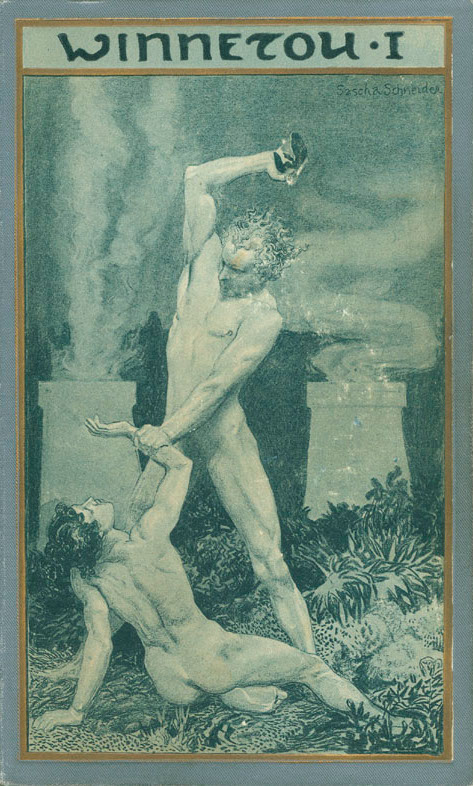 Buchdeckel des Romans Winnetou I von Karl May. Ausgabe von 1904, gestaltet von Sascha Schneider: Kain & Abel (Brudermord)